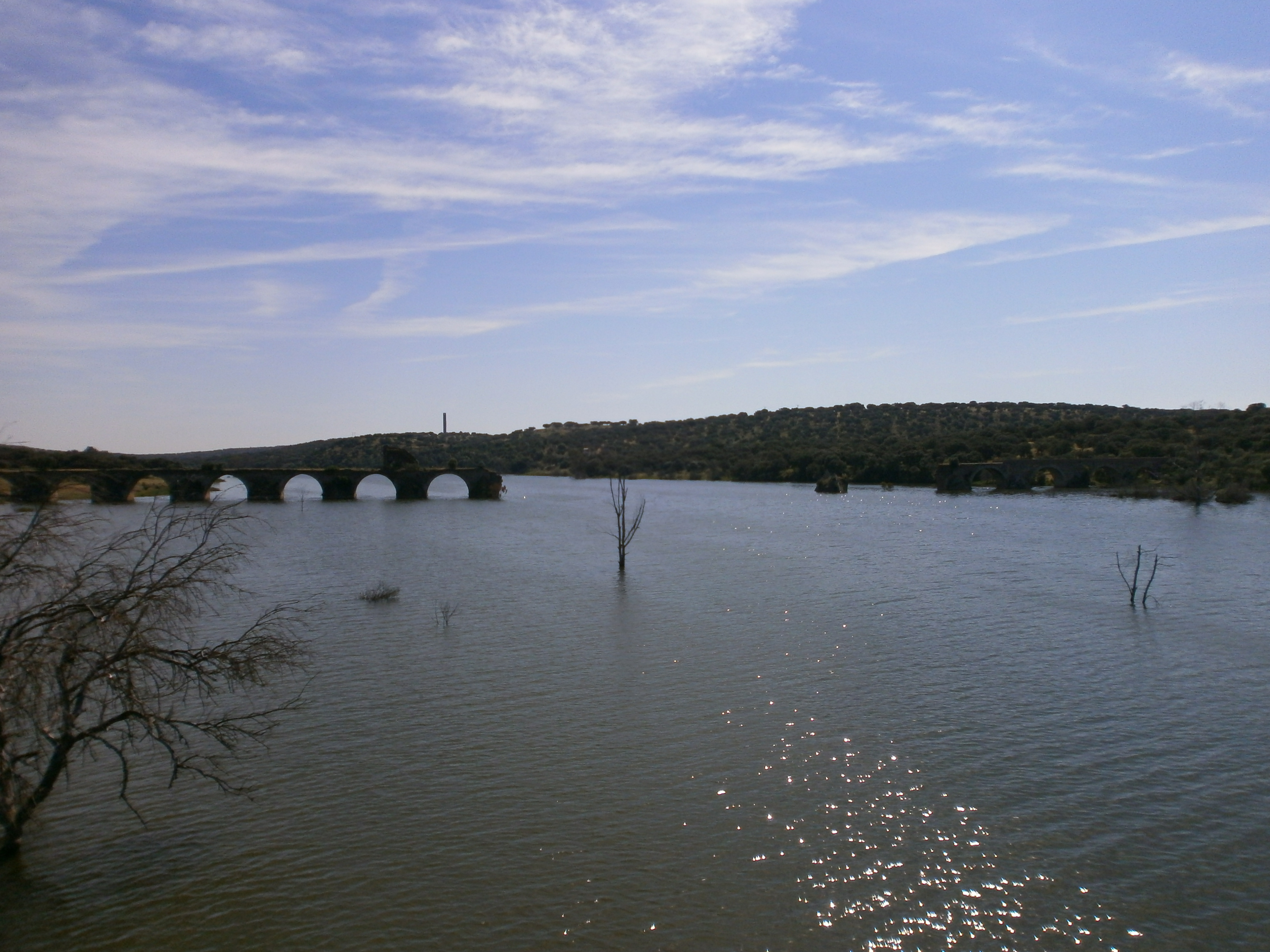 Puente Ayuda antiguo sobre el Guadiana ,fronterizo entre España(Olivenza) y Portugal(Elvas) visto desde el nuevo